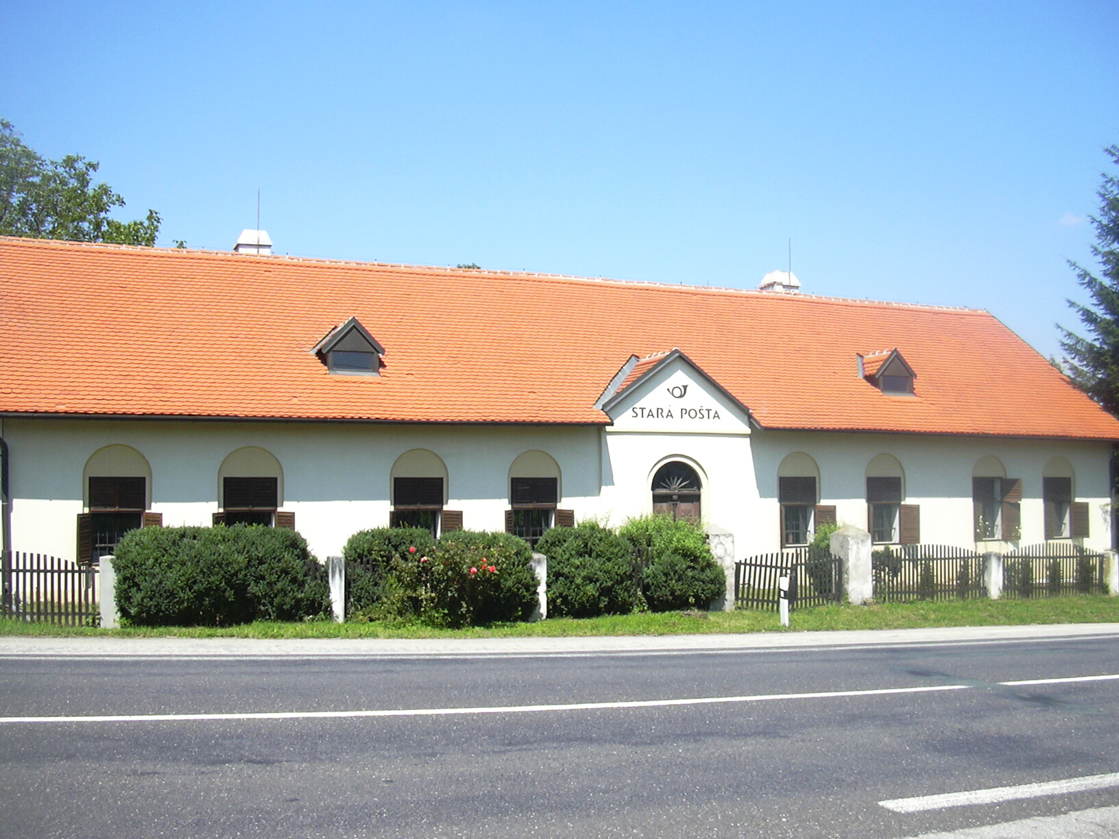 Stará pošta Kovalovice(Brno country District - Czech Republic)